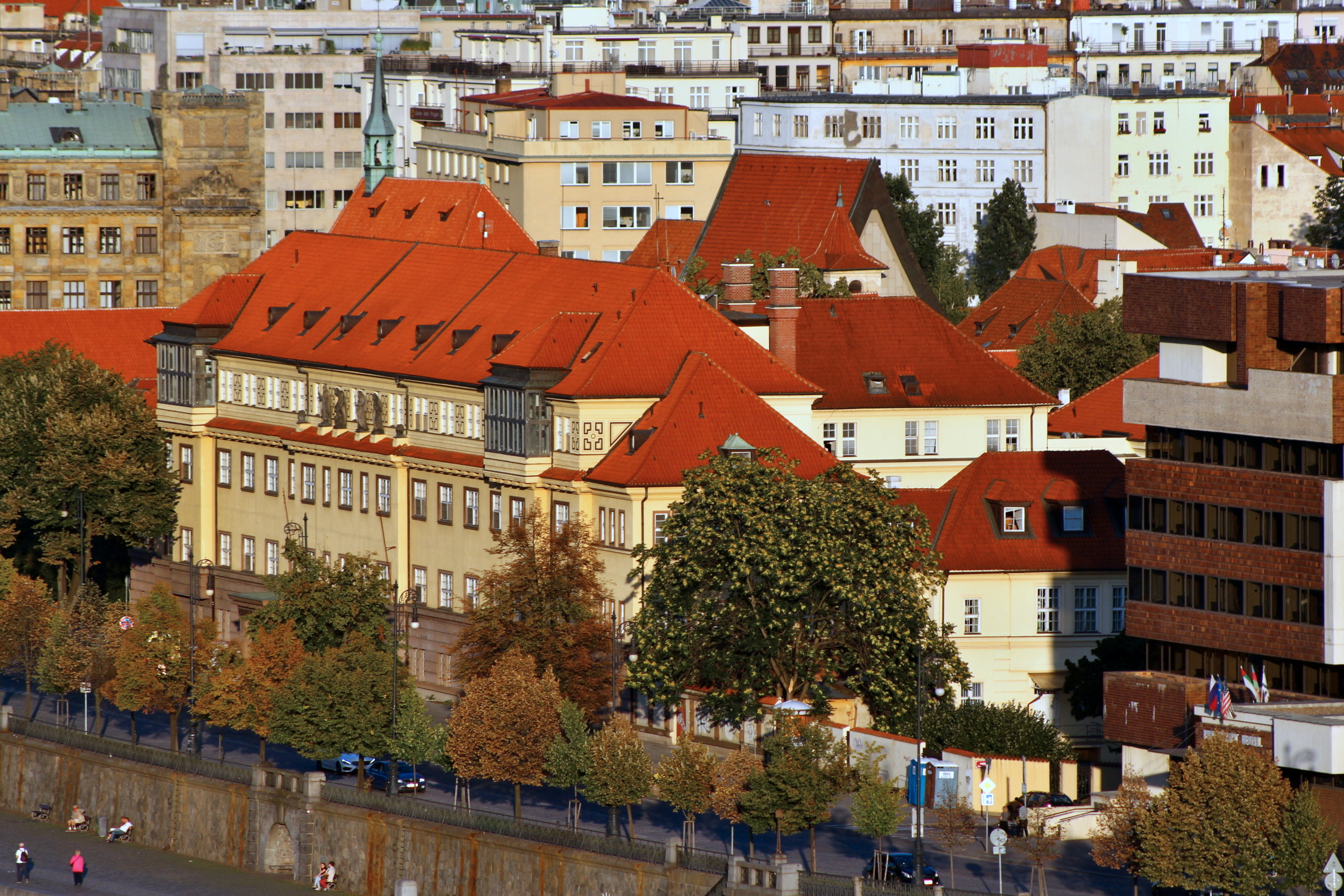 Pohled na Staré Město z Letné